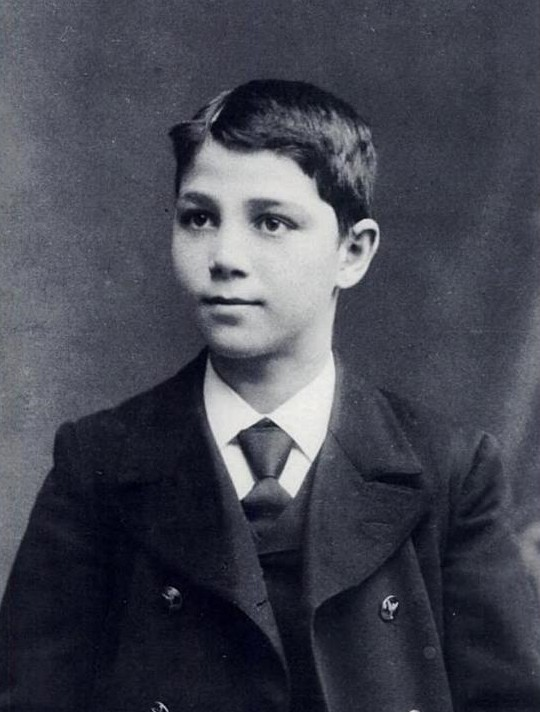 Ove Arup im Jahr 1906